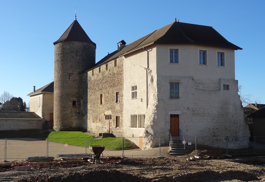 Vue côté nord-est montrant la partie restante de l'aile nord (rénovée récemment) et le donjon sud-est.